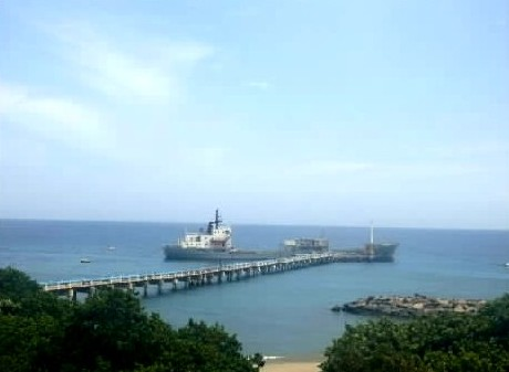 Muelle en Guanta Anzoátegui -Venezuela